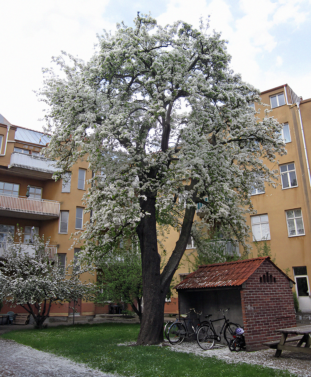 Ett träd av Augustipäron blommar i maj på en bakgård i centrala Ystad 2013.